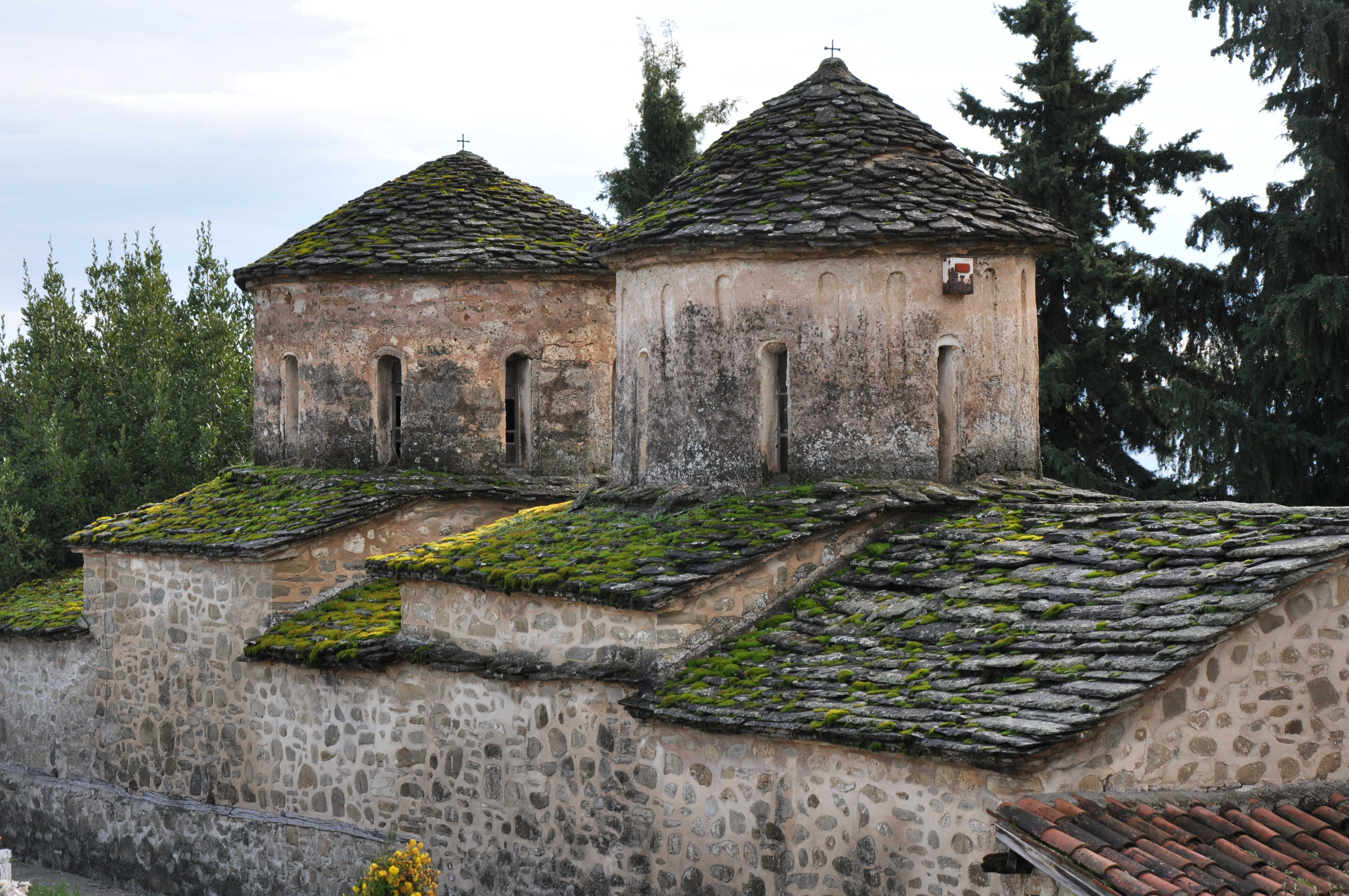 Ναός Αγ. Γεωργίου Οξύνειας«Ναός Αγ. Γεωργίου Οξύνειας»